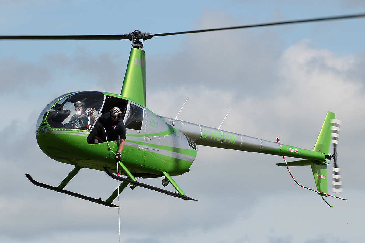 G-ROYM Robinson R44 Raven II @ Booker 03/06/2017